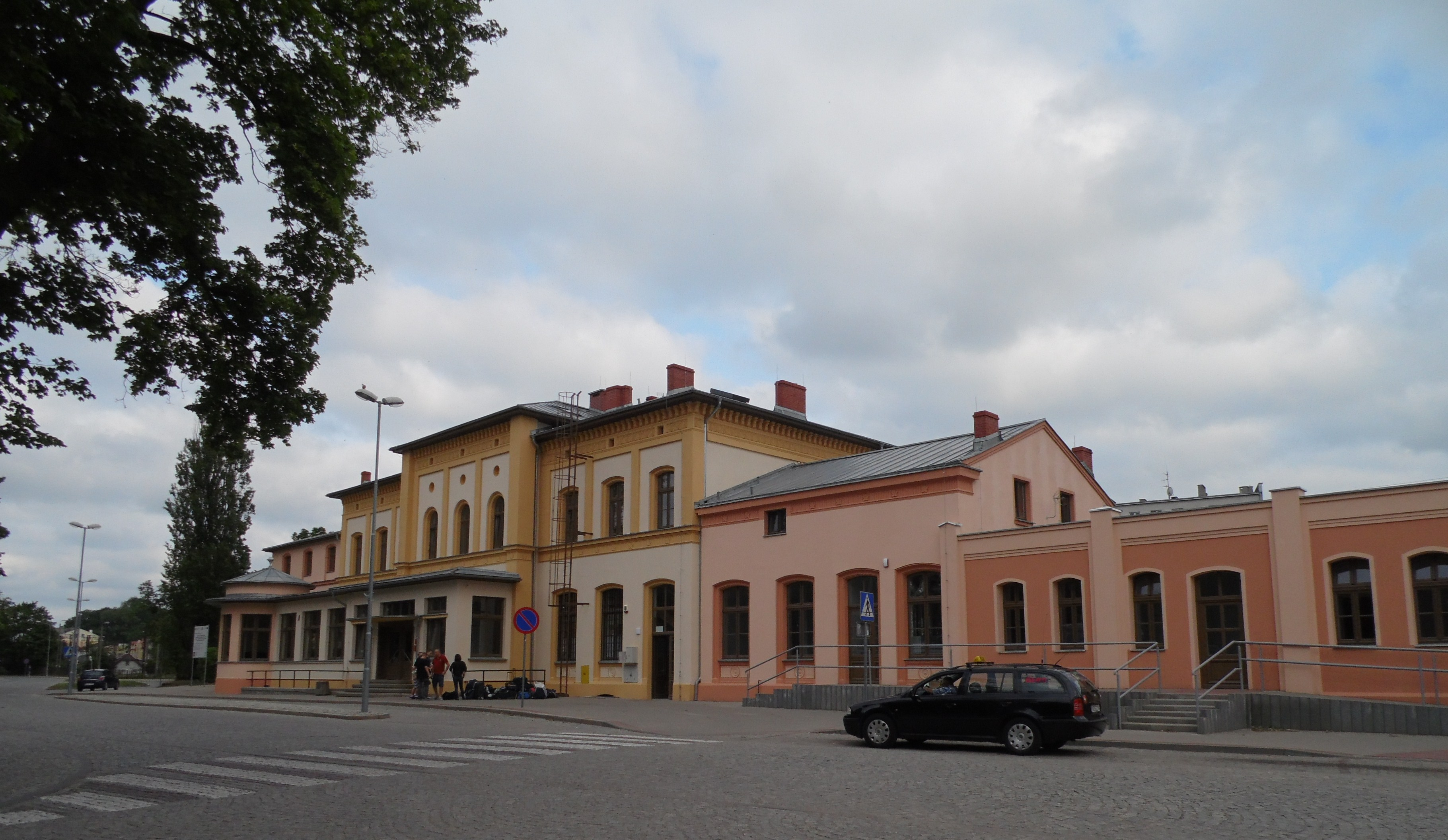 PKP. WIDOK DWORCA KOLEJOWEGO OD ULICY.